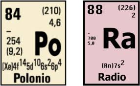 polonio eta radio